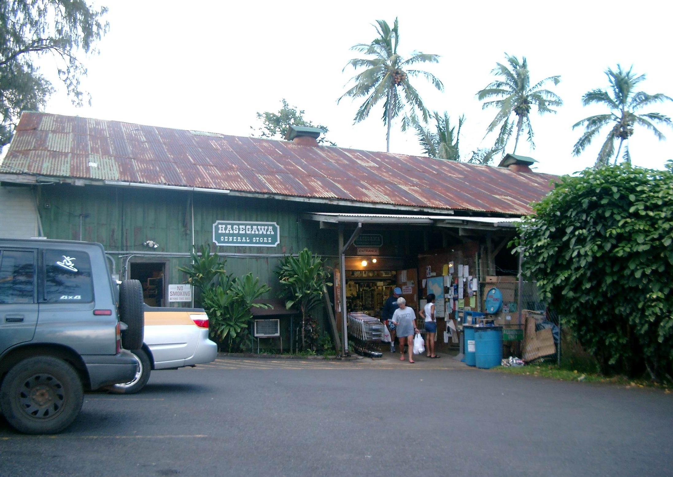 Hasegawa General Store in Hana, Maui, Hawaii.